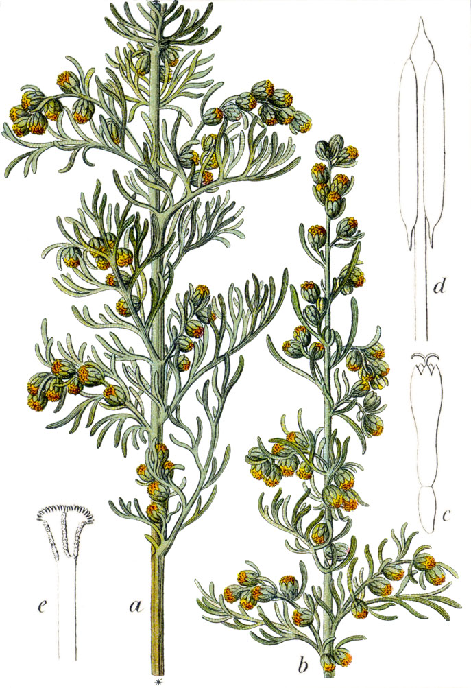 Küsten-Beifuss, Artemisia maritima